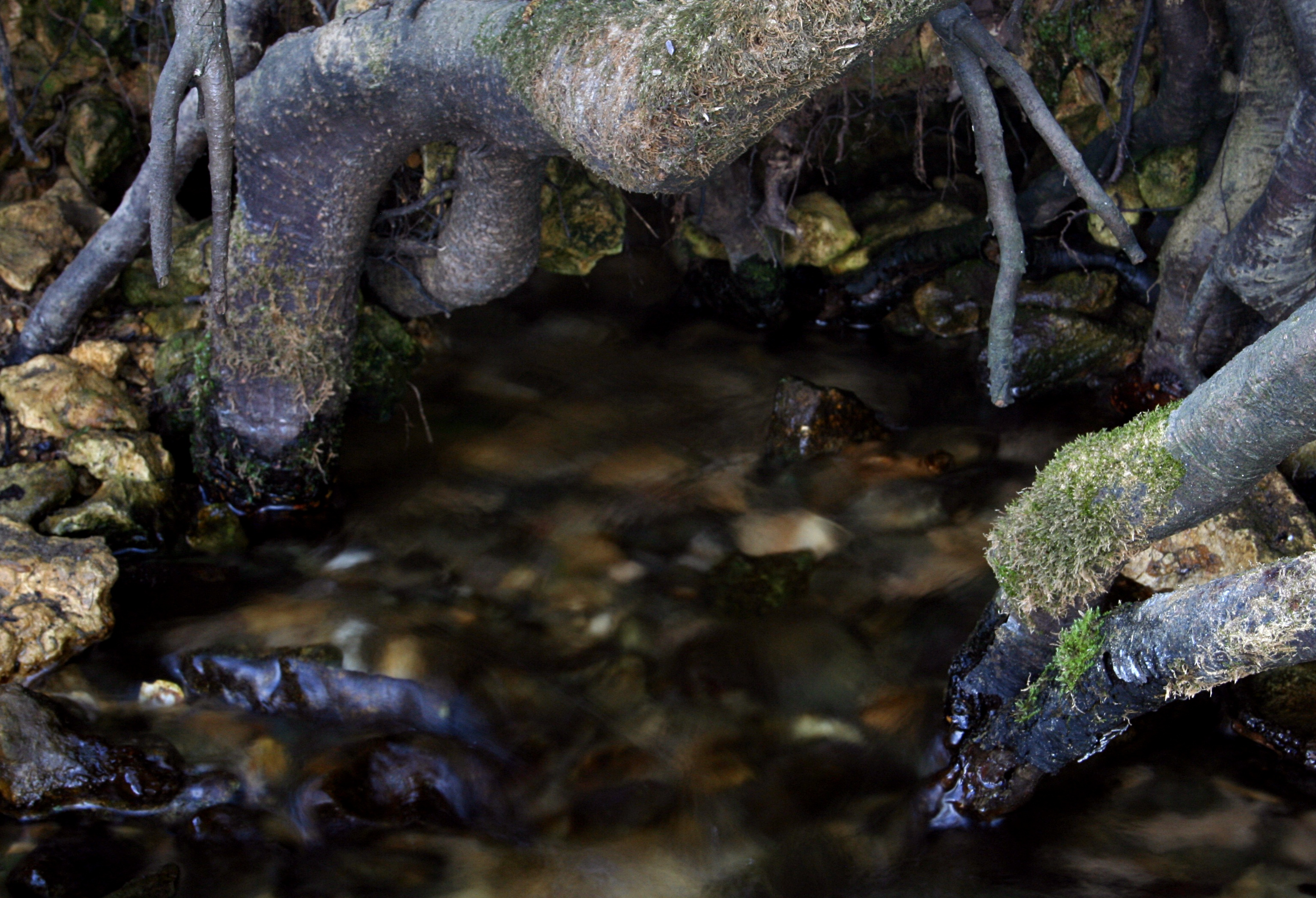 Granatowe Źródła - pomnik przyrody na obszarze Załęczańskiego Parku Krajobrazowego, kilkaset metrów od Starej Wsi